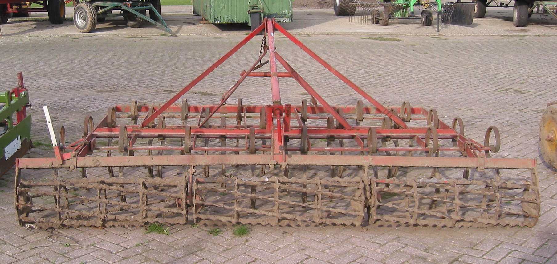 Verkruimelrollen achter cultivator of tandeg met geveerde tanden (triltandcultivator)